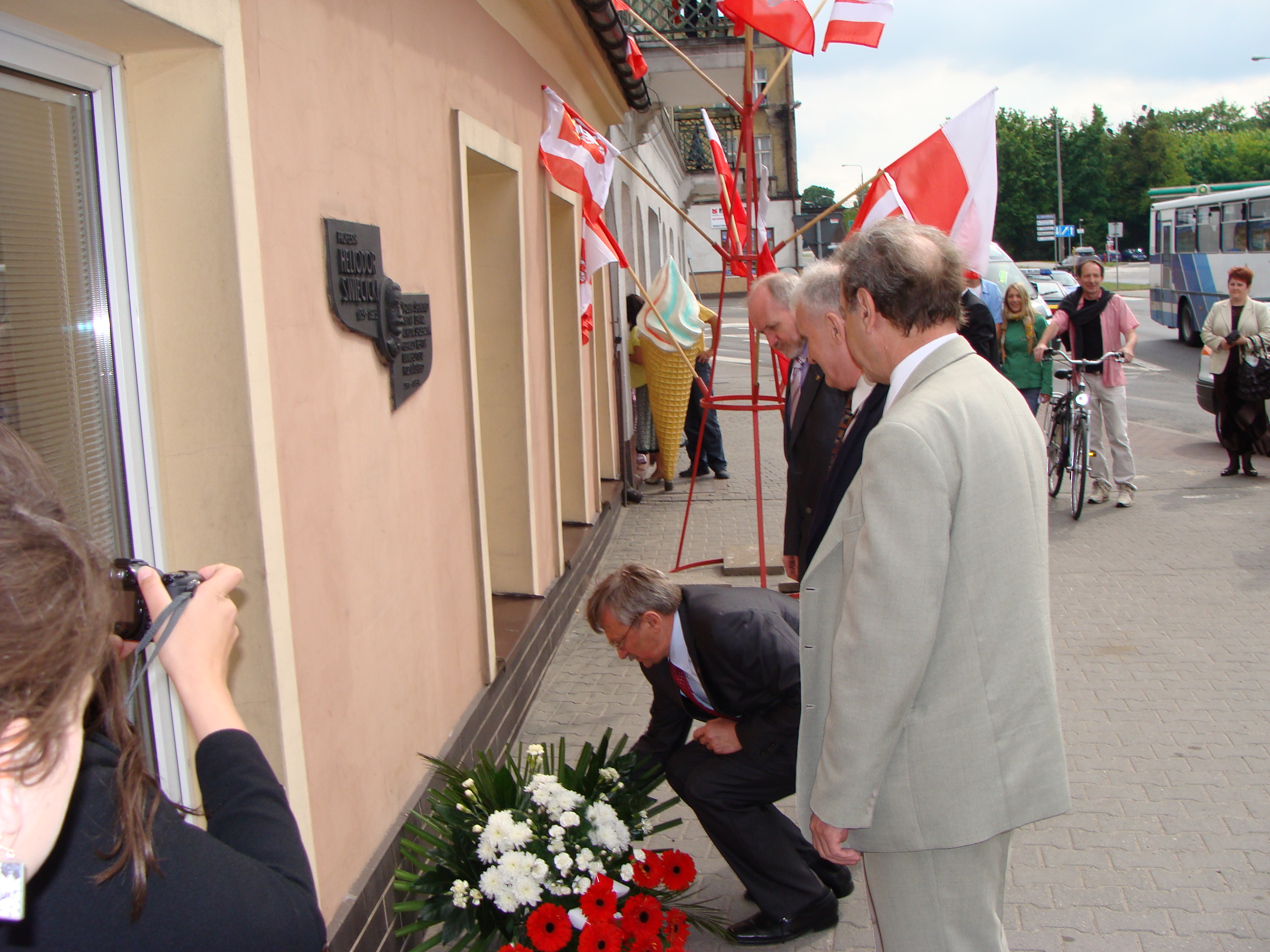 Śrem, Obchody 90-lecia Uniwersytetu im. Adama Mickiewicza w Poznaniu, zakończenie rajdu śladami Heliodora Święcickiego.